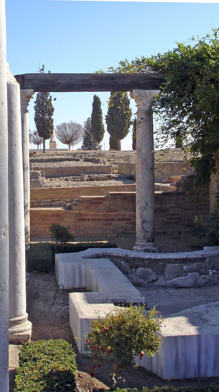 Villa Romana en Itálica, España (Spain)